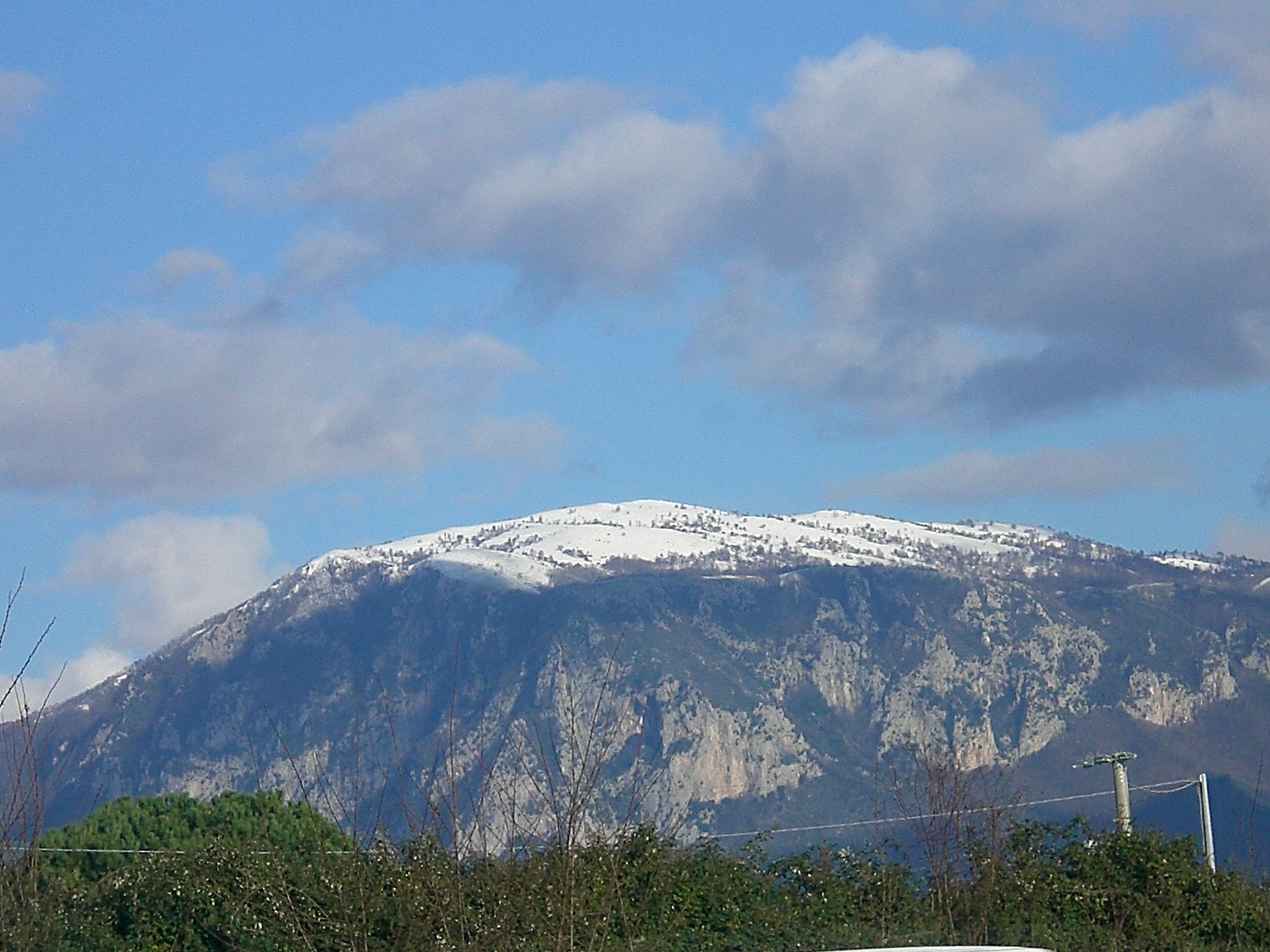 Il monte Raione visto dal versante occidentale.